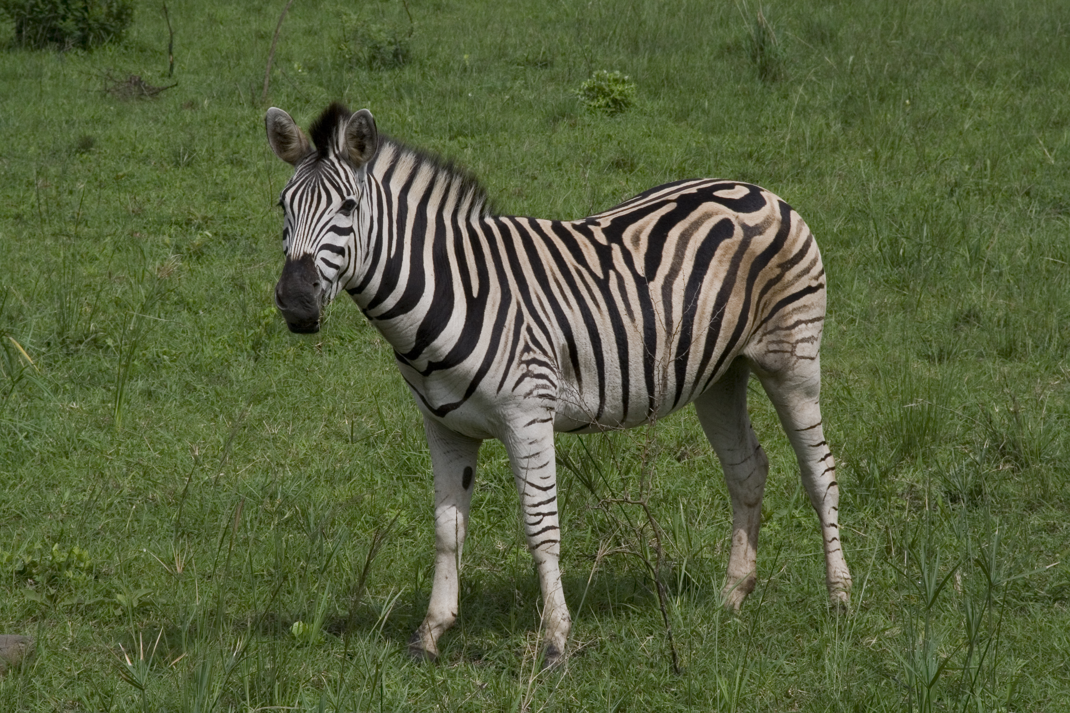 Equus quagga